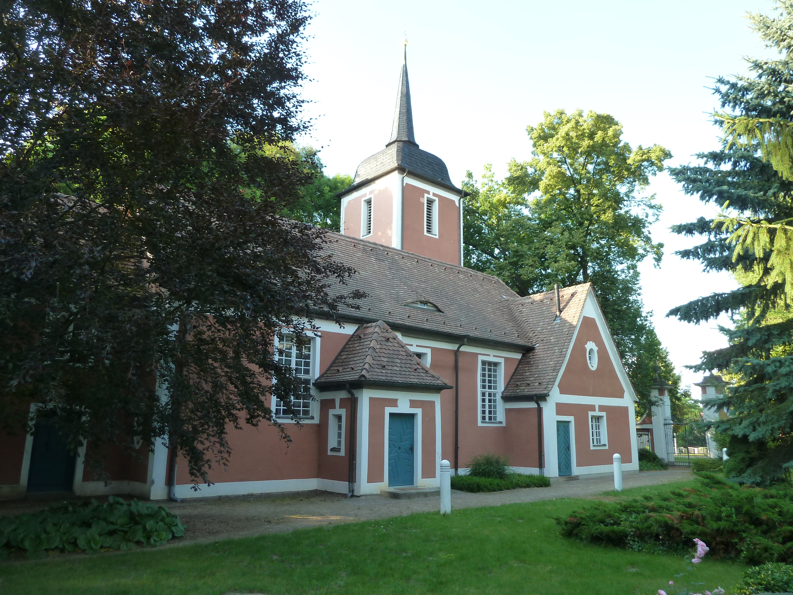 Denkmalgeschützte Kirche Falkenrehde